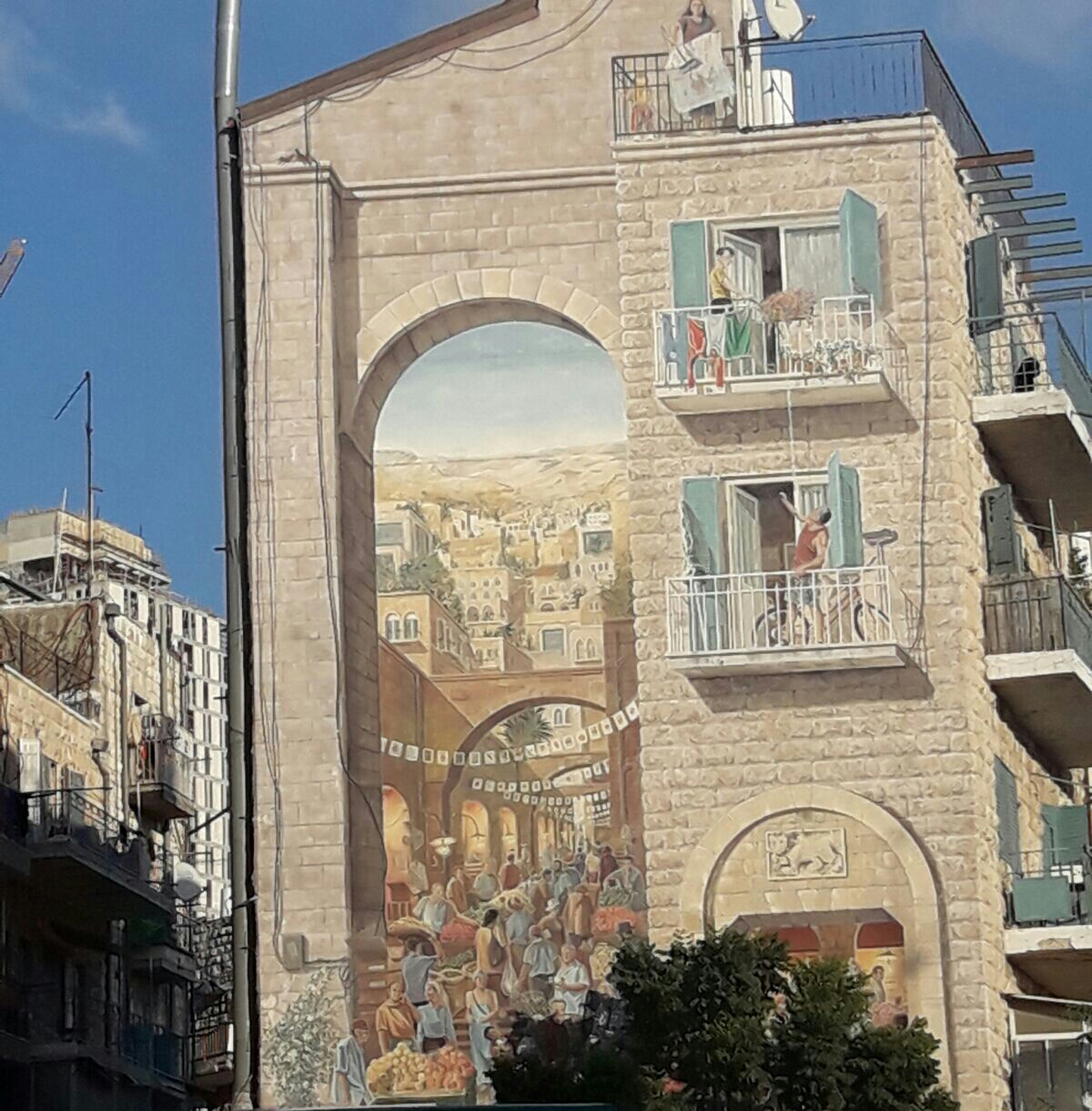 אשליה אופטית בירושלים